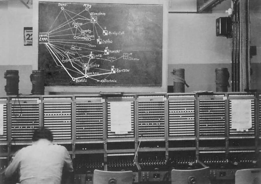 Fernsprechvermittlung "Zeppelin" am 25.08.1939